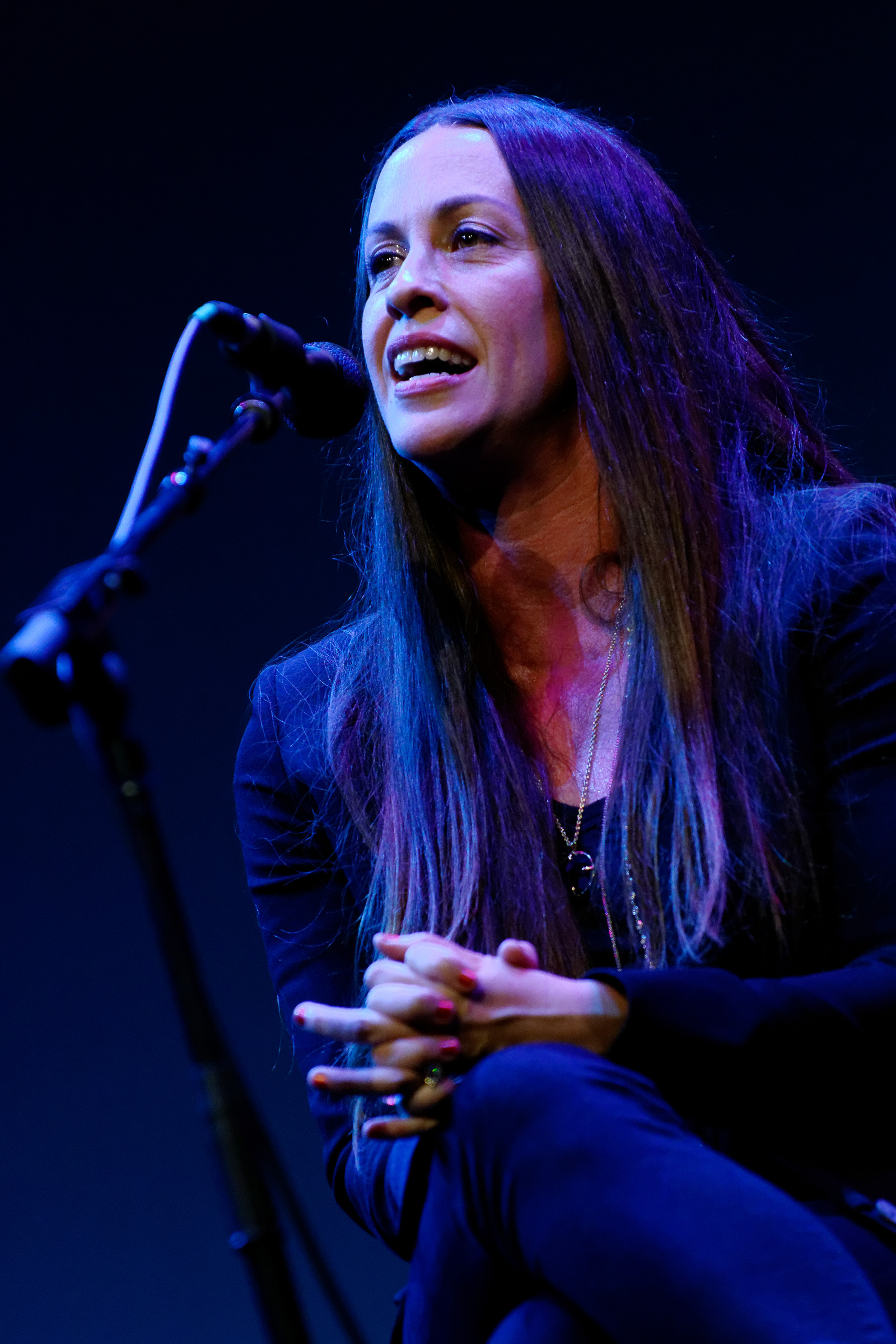 A cantora e compositora canadense Alanis Morissette em apresentação no Teatro Saban, em Beverly Hills, na Califórnia (Estados Unidos), em 20 de outubro de 2013.